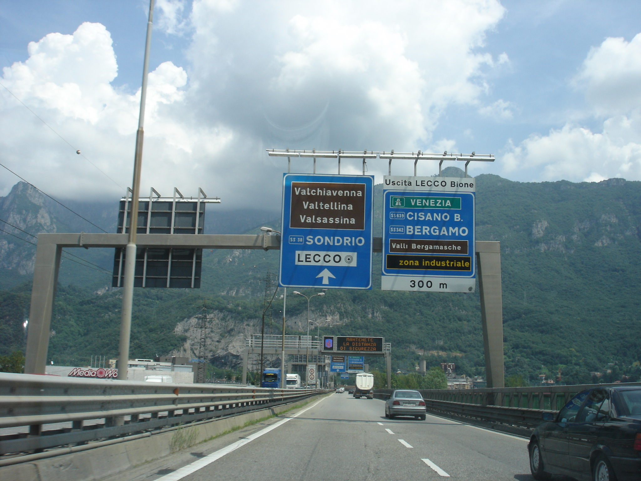 Sono l'autore. Uscita SS36 Lecco